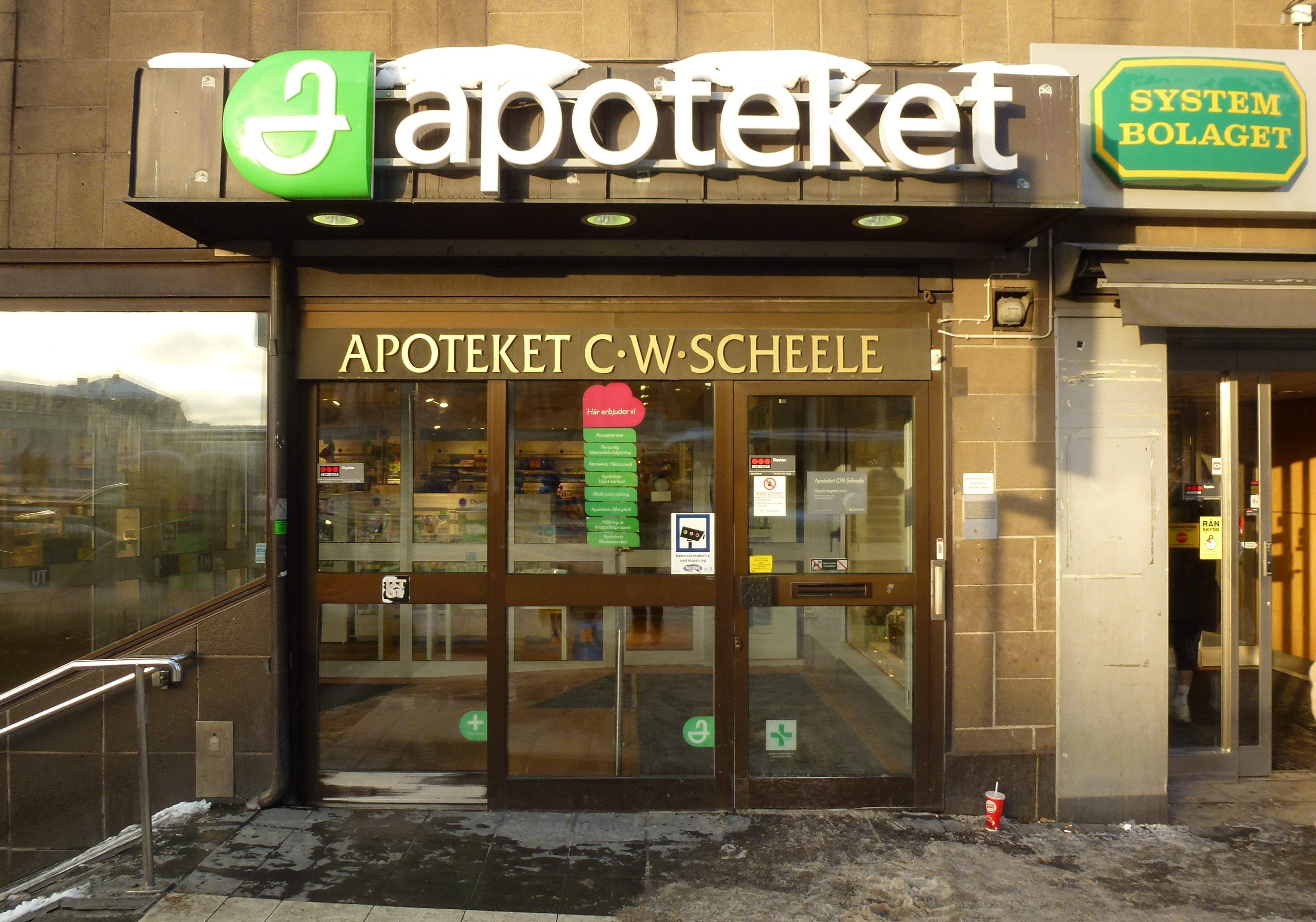 Fastigheten Orgelpipan 7, Klarabergsgatan 56-64, Apoteket Scheele